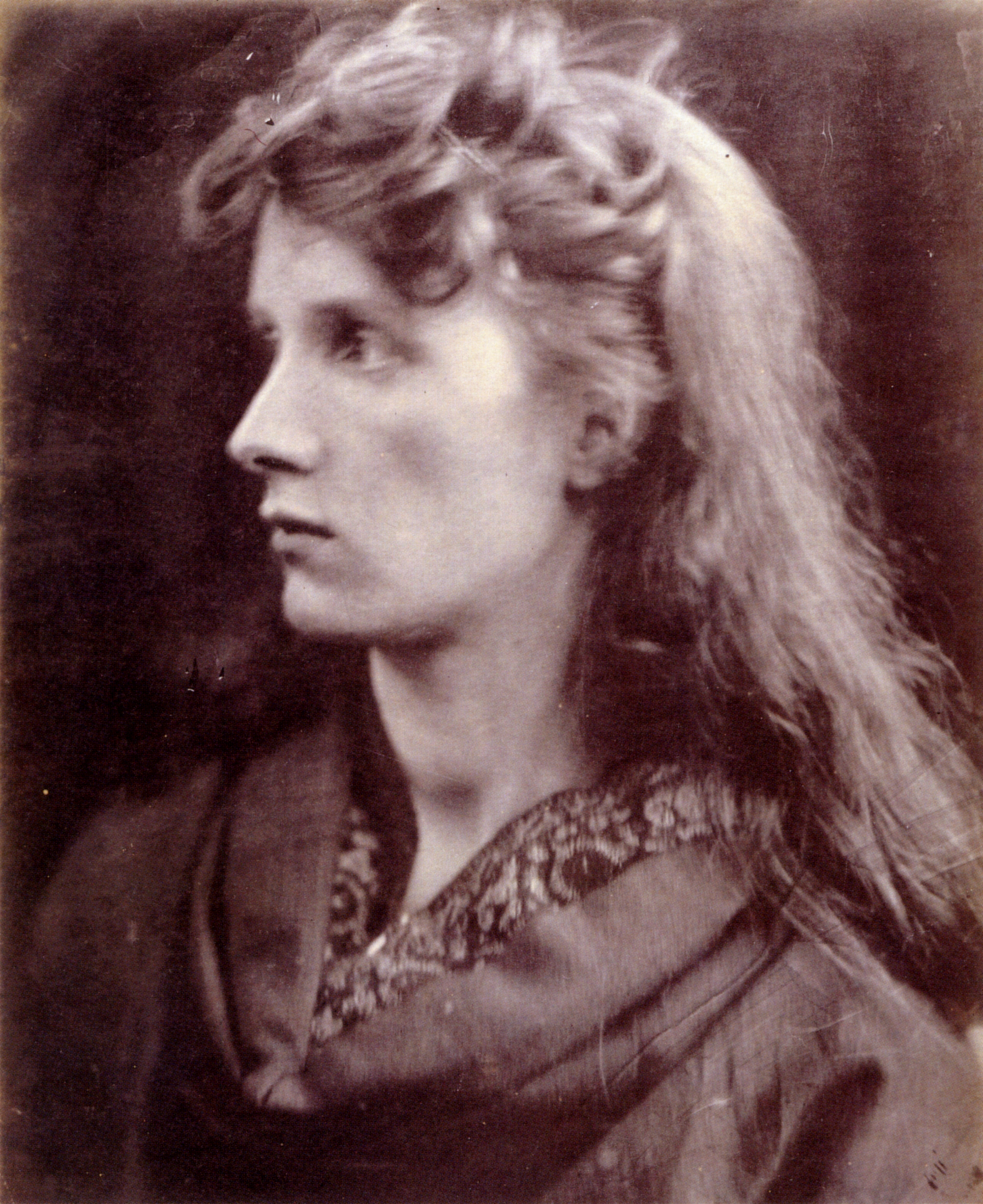 Lady Clara Vere de Vere. Depicts Mrs. Keene. Albumen print, 274 x 224mm (10 3/4 x 8 7/8").